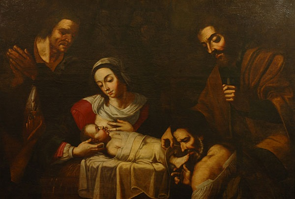 La obra representa el momento en que el Niño Jesús fue adorado por los pastores de Belén, y procede del retablo mayor de la iglesia del Carmen de Manresa.